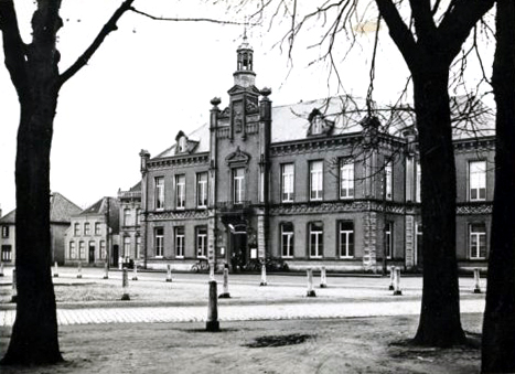 Oude stadhuis & kantongerecht aan de Markt in Veghel